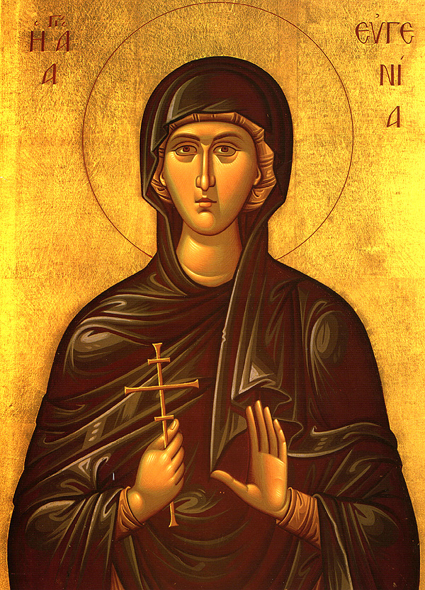 Ikone der heiligen Eugenia